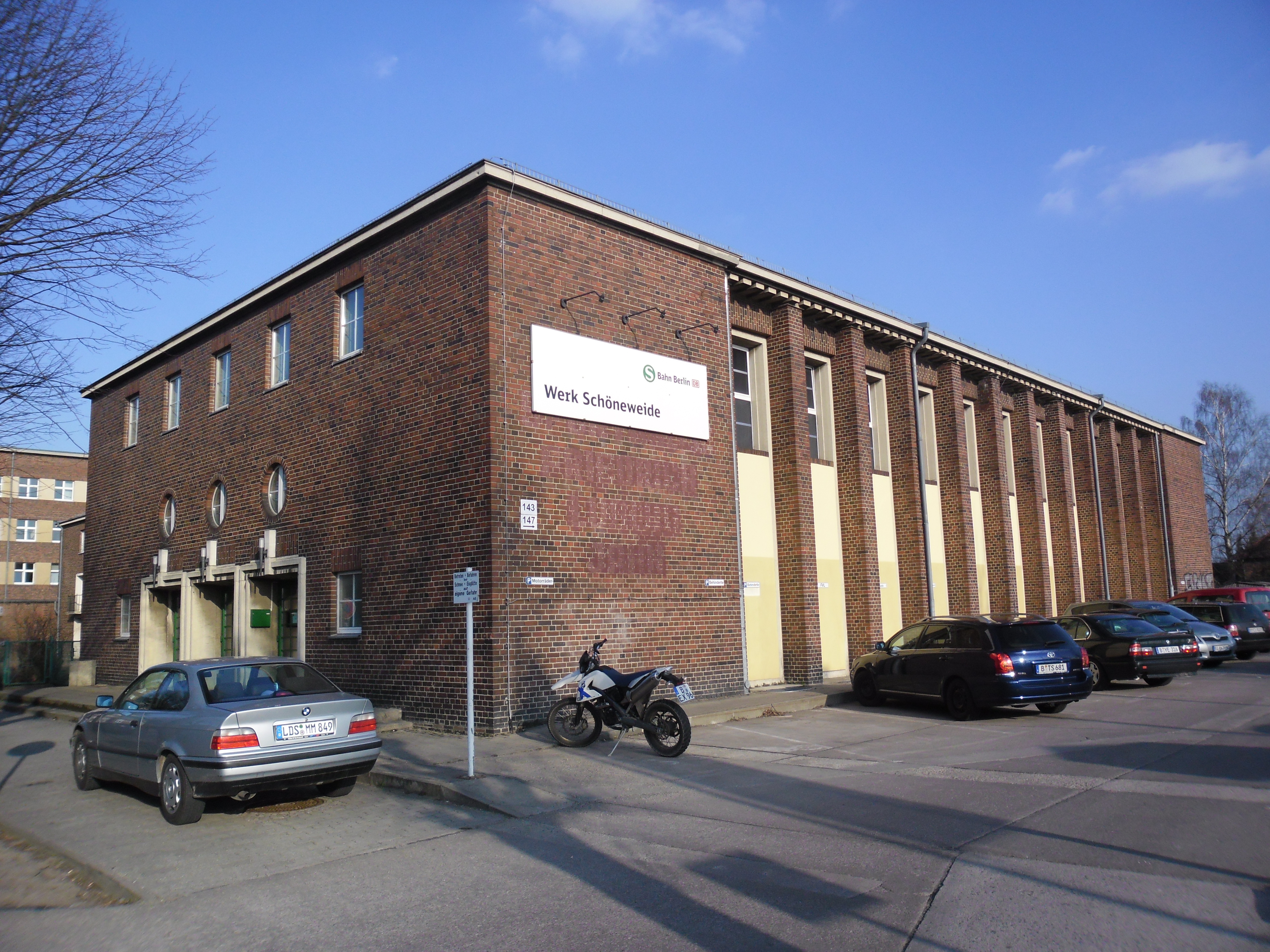 Reichsbahnausbesserungswerk Schöneweide